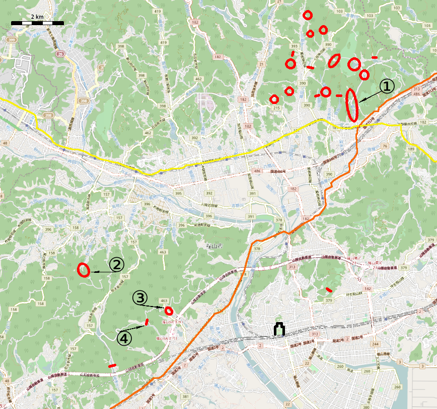 広島県福山市にある砂留の分布図 This map may be incomplete, and may contain errors. Don't rely solely on it for navigation.